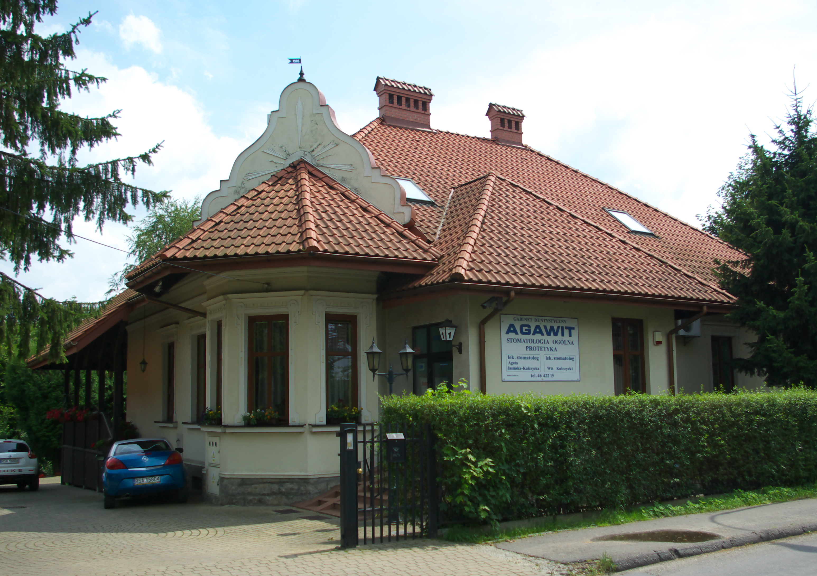 Dom przy ulicy Głowackiego 1 w Sanoku